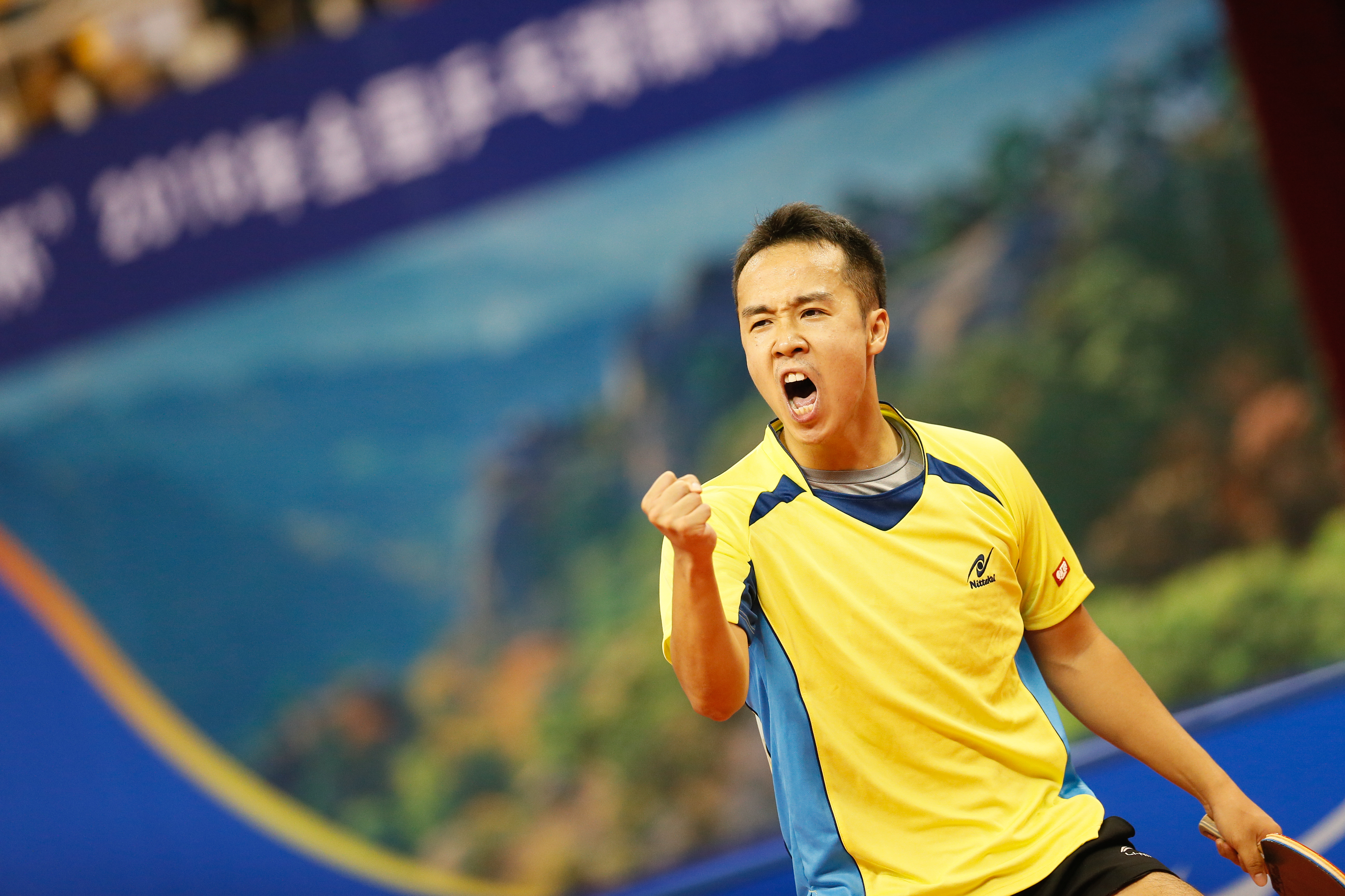 _K0K9270